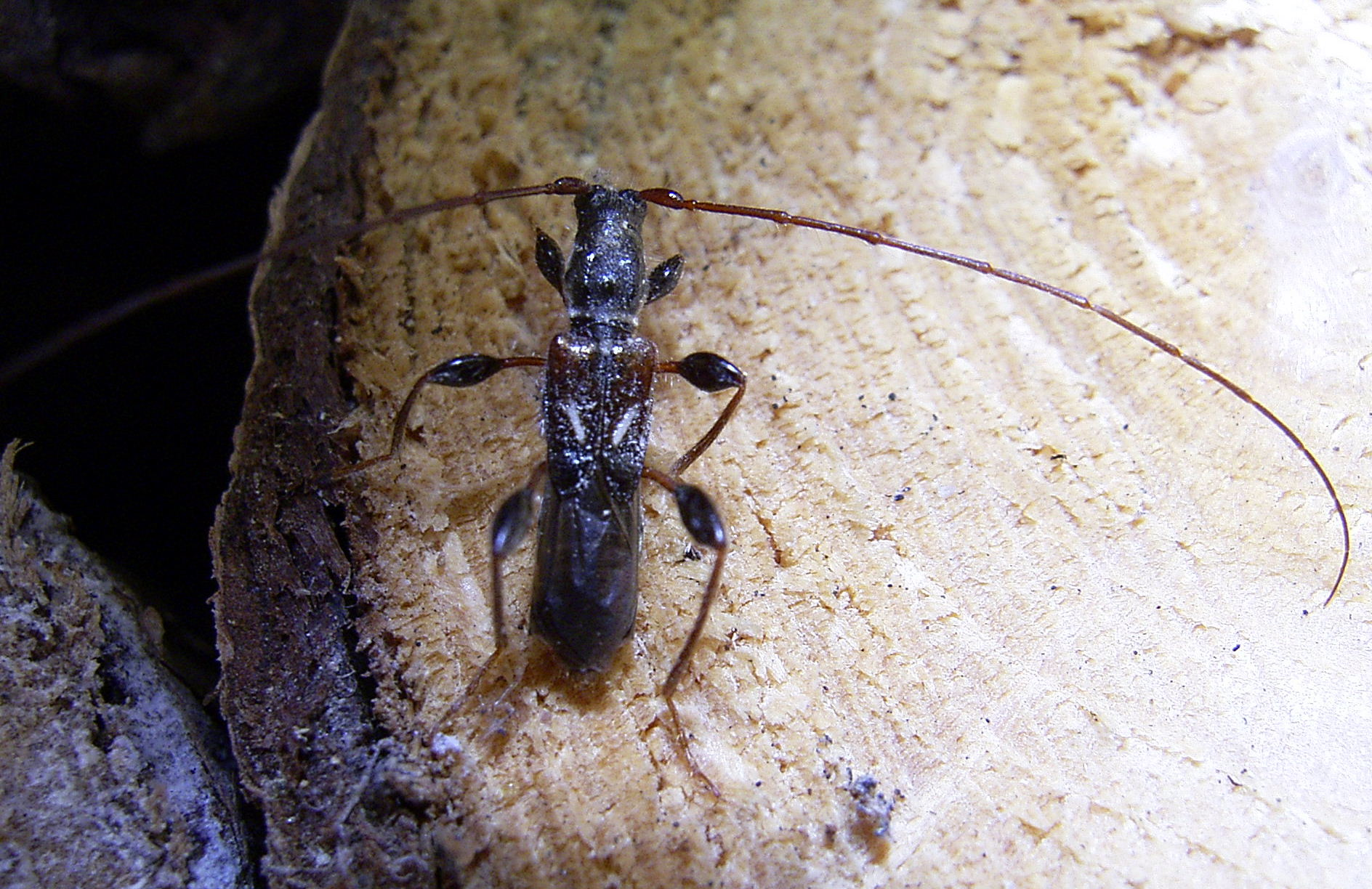 Molorchus minor auf Brennholzstapel Fichte